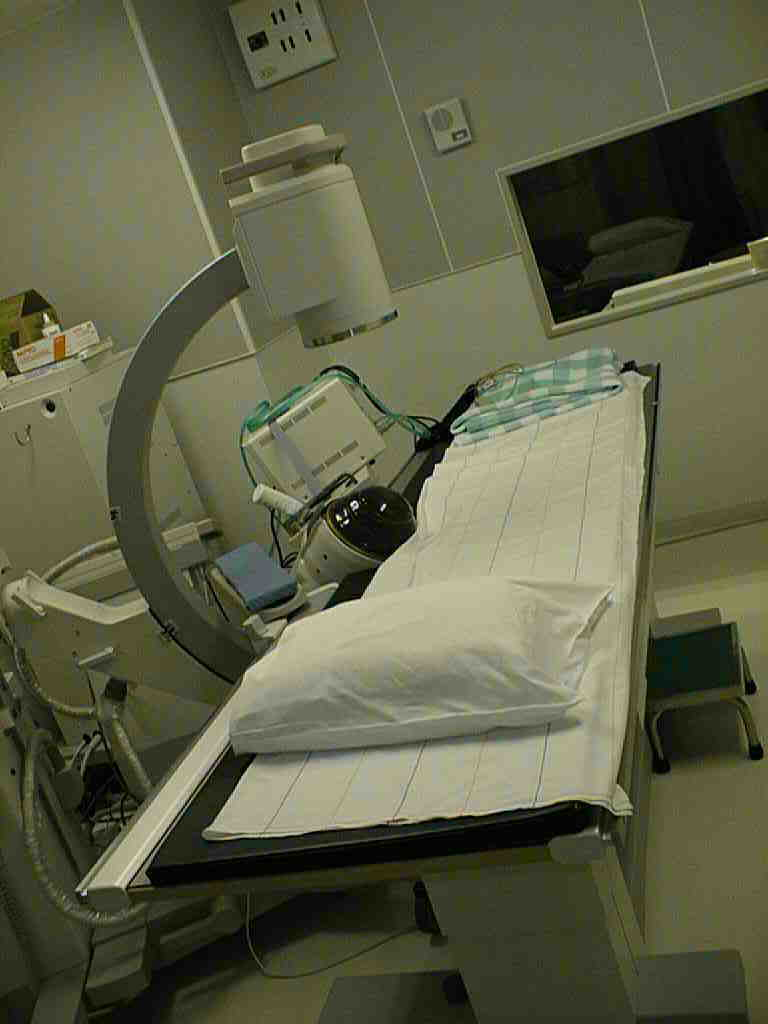 Nierensteinzertrümmerer (ESWL), Gerät der neueren Bauart (2005). Glänzend schwarz: Silikongummiblase; oben am halbkreisförmigen Arm: Röntgenquelle.